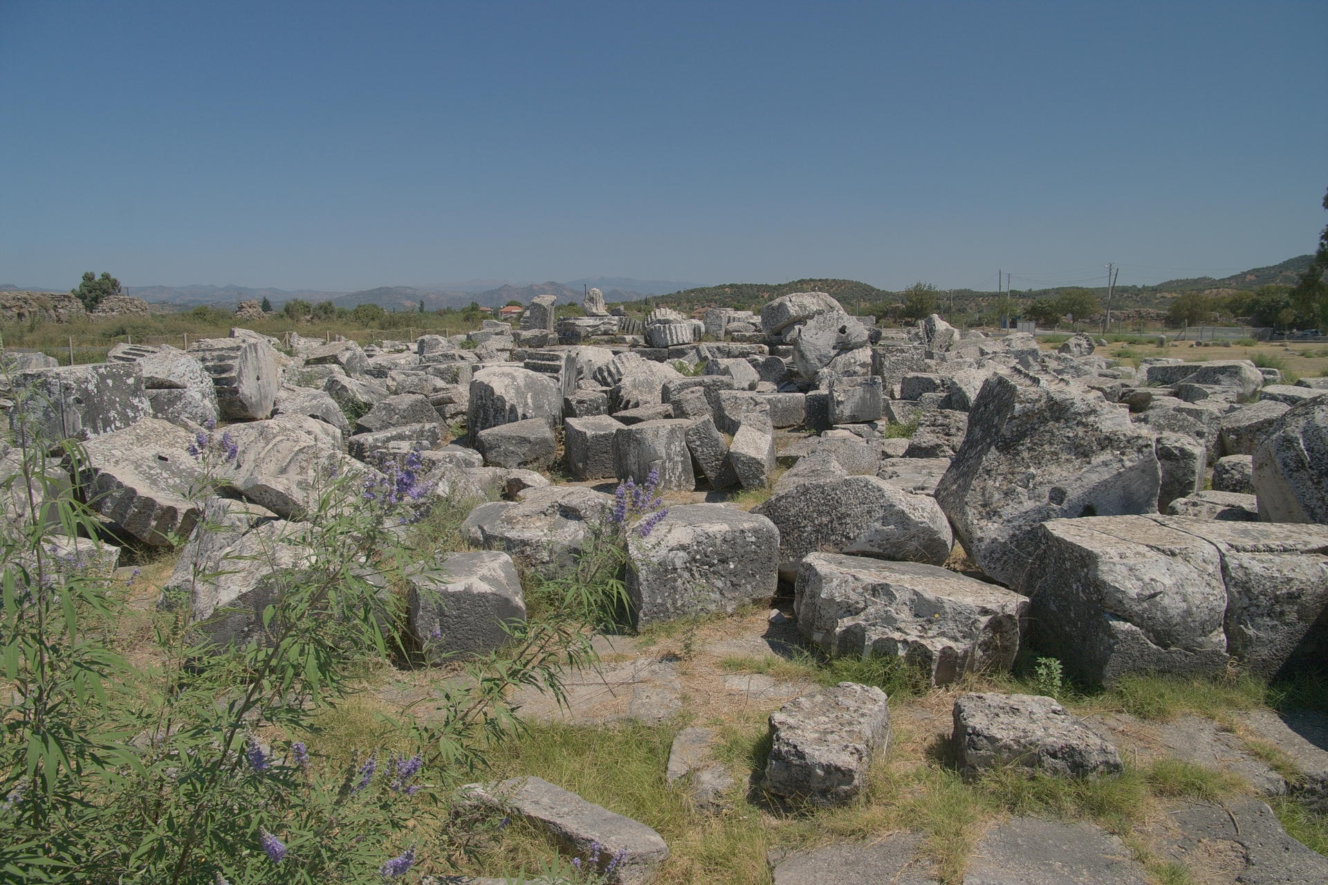 Магнесия на Меандре. Храм Артемиды Левкофрины